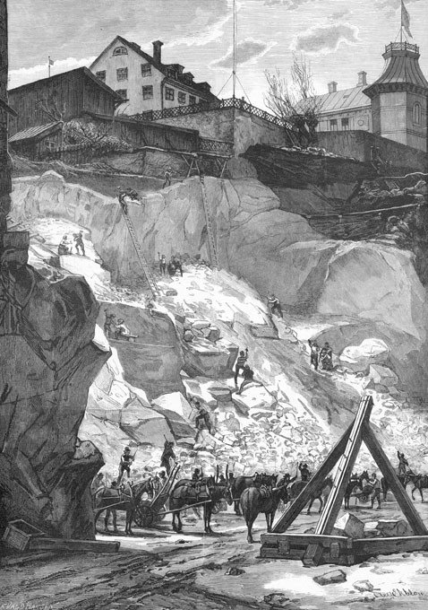 Teckningen utförd av Axel Ekbom 1885 föreställer sprängarbetet inför Mariahissen byggande.